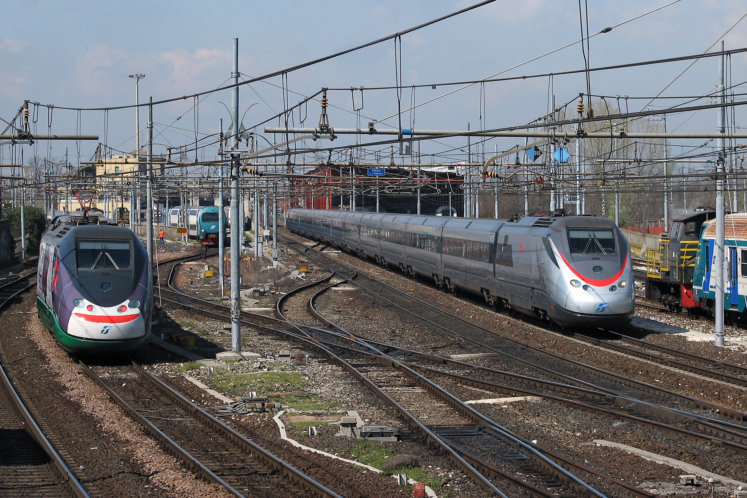 Vista della radice ovest della stazione di Padova durante un momento di traffico intenso. Da sinistra: un ETR 500 diretto a Roma imbocca la ferrovia Padova - Bologna; un TAF attende di uscire dal Deposito Locomotive; un secondo ETR 500 sta arrivando dalla linea di Milano con un invio a vuoto per Venezia Santa Lucia; una locomotiva gruppo 245 sta manovrando una colonna di vetture sul binario che conduce alla Platea Lavaggio il cui capannone è visibile sullo sfondo.